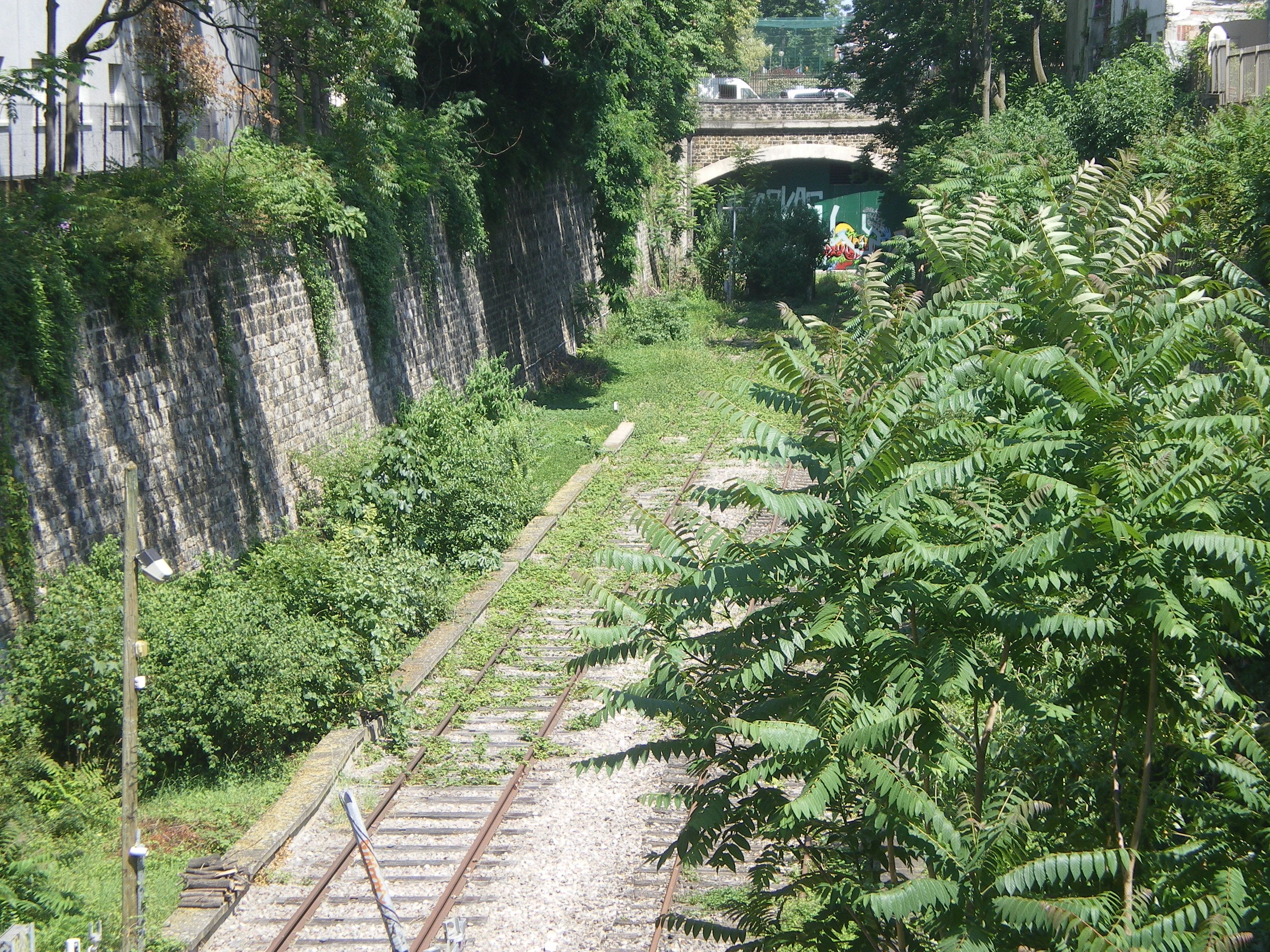 La gare Maison Blanche à Paris